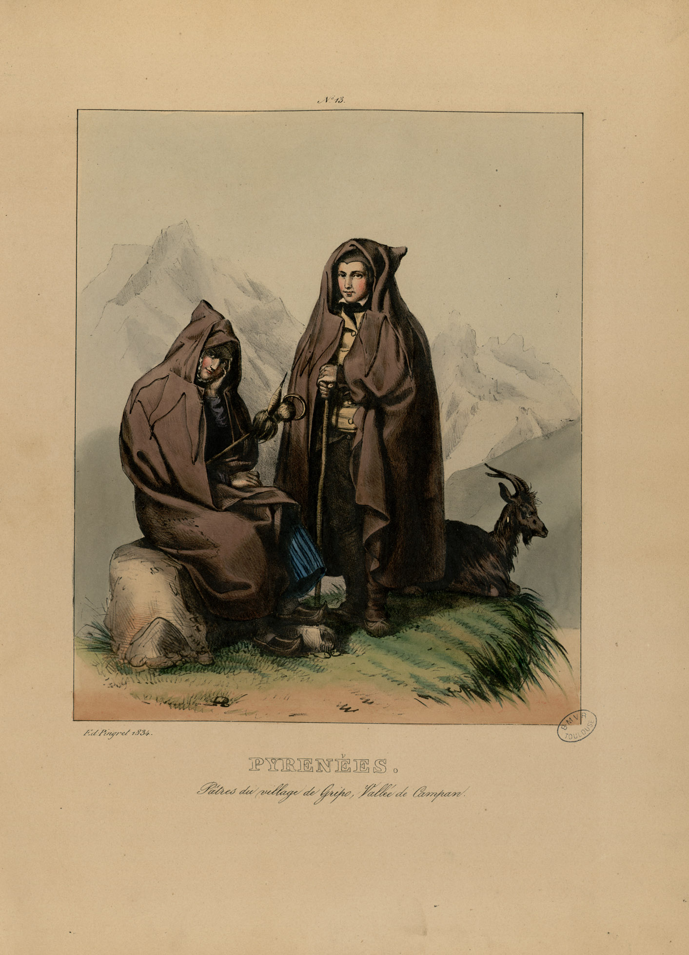 Ancely, René (1876 - 1966). Possesseur